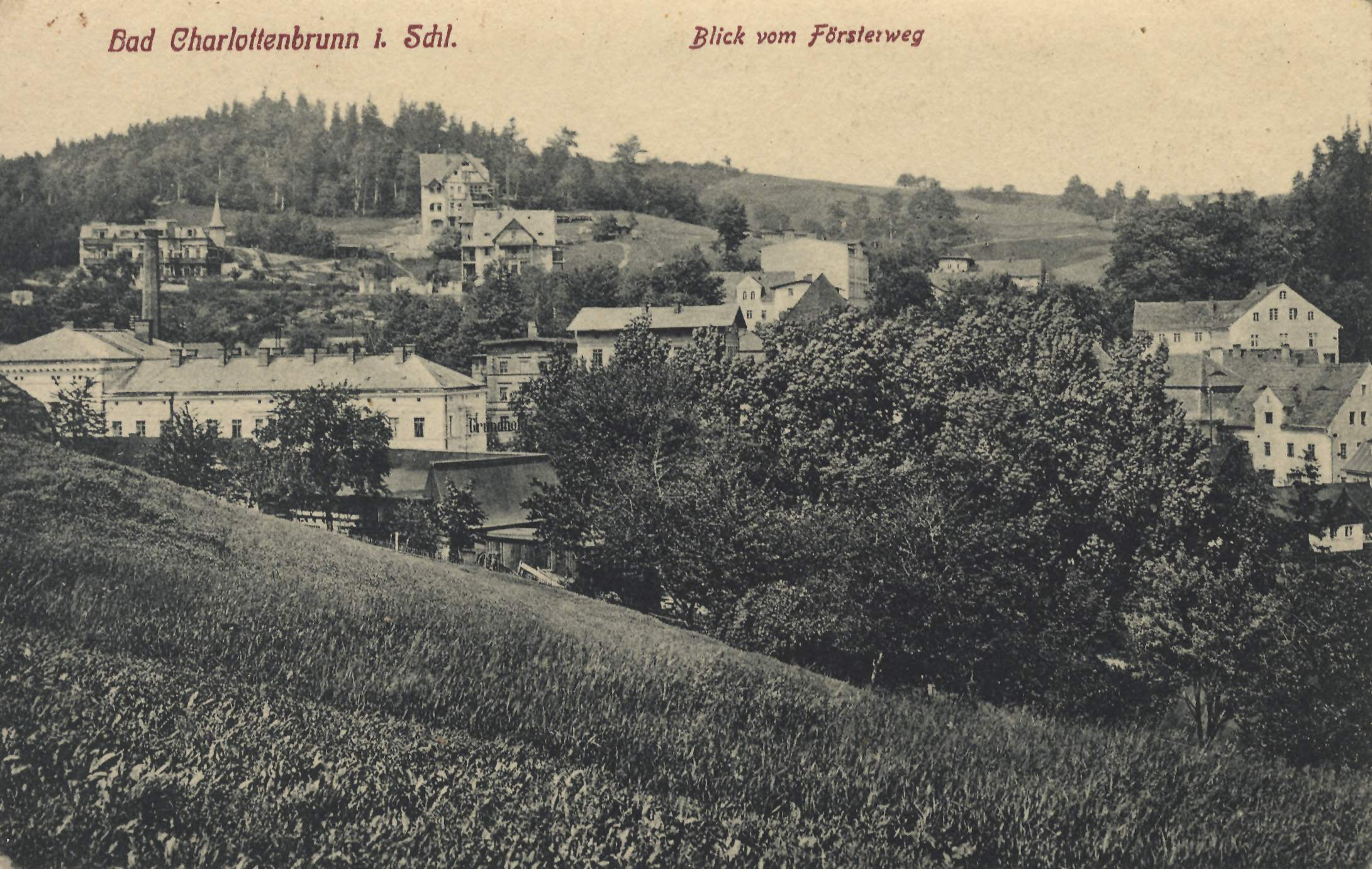 Jedlina-Zdrój (niem. Bad Charlottenbrunn)